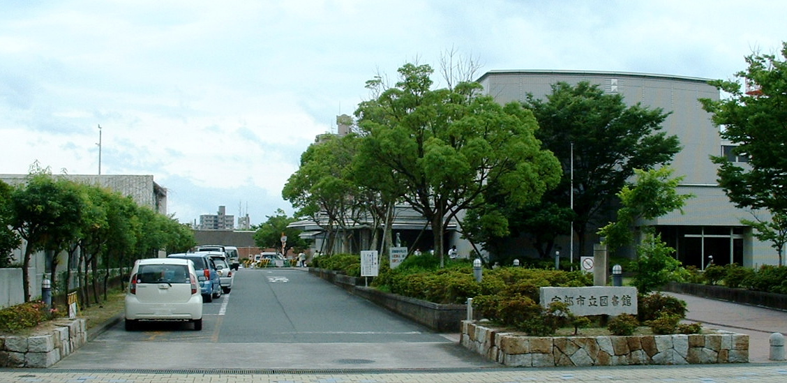 宇部市立図書館。2010年7月11日撮影。